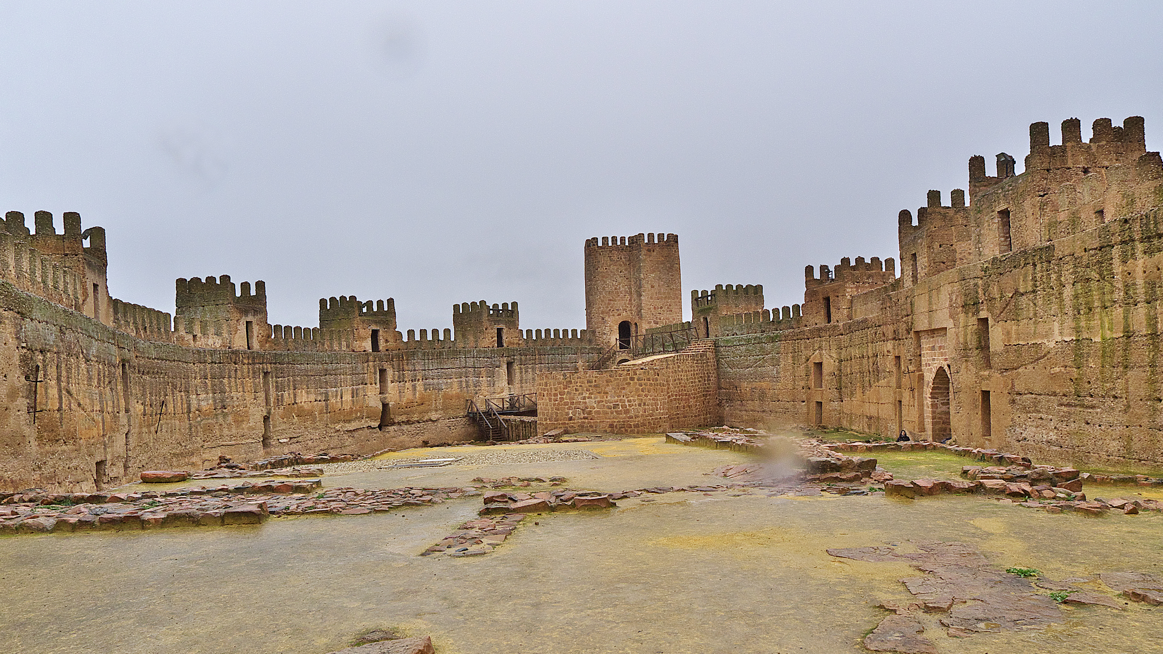 El califa omeya al-Hakam II (961-976) construye el Castillo de Burgalimar (968), estratégicamente situado para controlar las incursiones desde Despeñaperros a Córdoba. El Burch al Hammam (castillo de baños) el el castillo con mayor antigüedad de España.